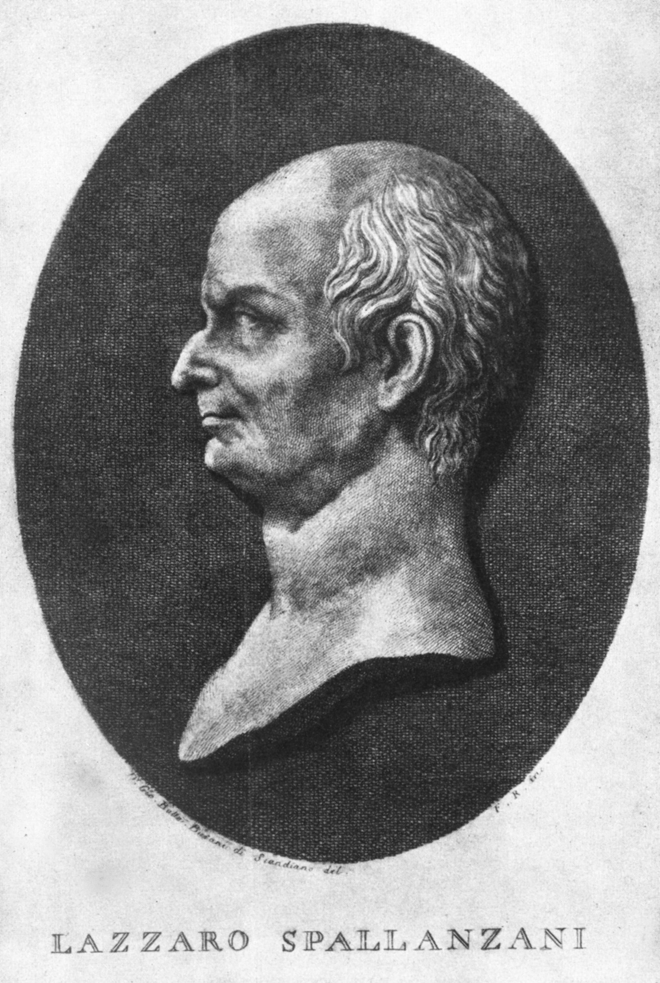 Lazzaro Spallanzani